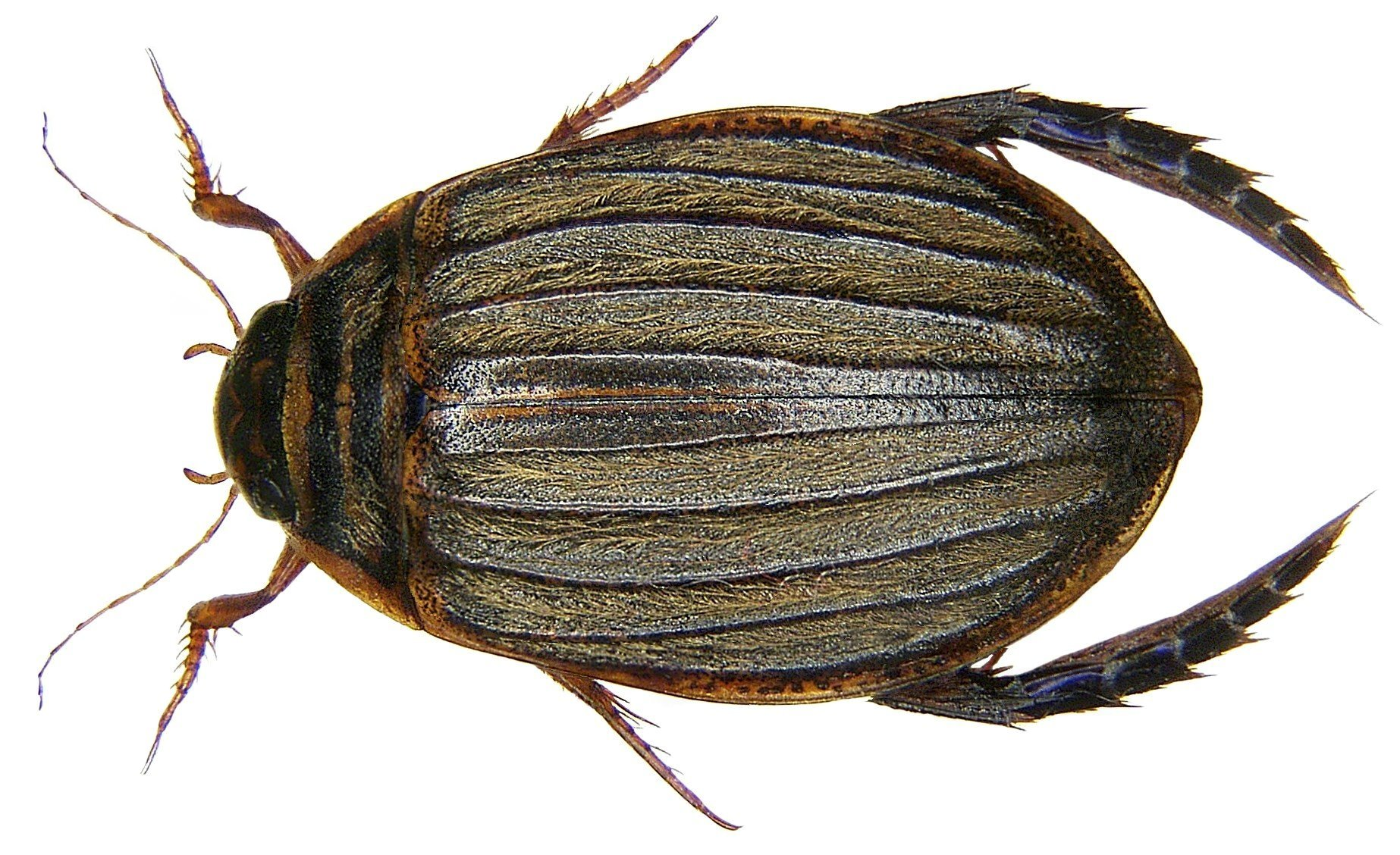 Acilius sulcatus (Linné, 1758) female Familie: Dytiscidae Groesse. 15-18 mm Fundort: Germania, Bayern, Oberfranken, Selbitz leg. det. U.Schmidt, 1971 Photo: U.Schmidt, 2008